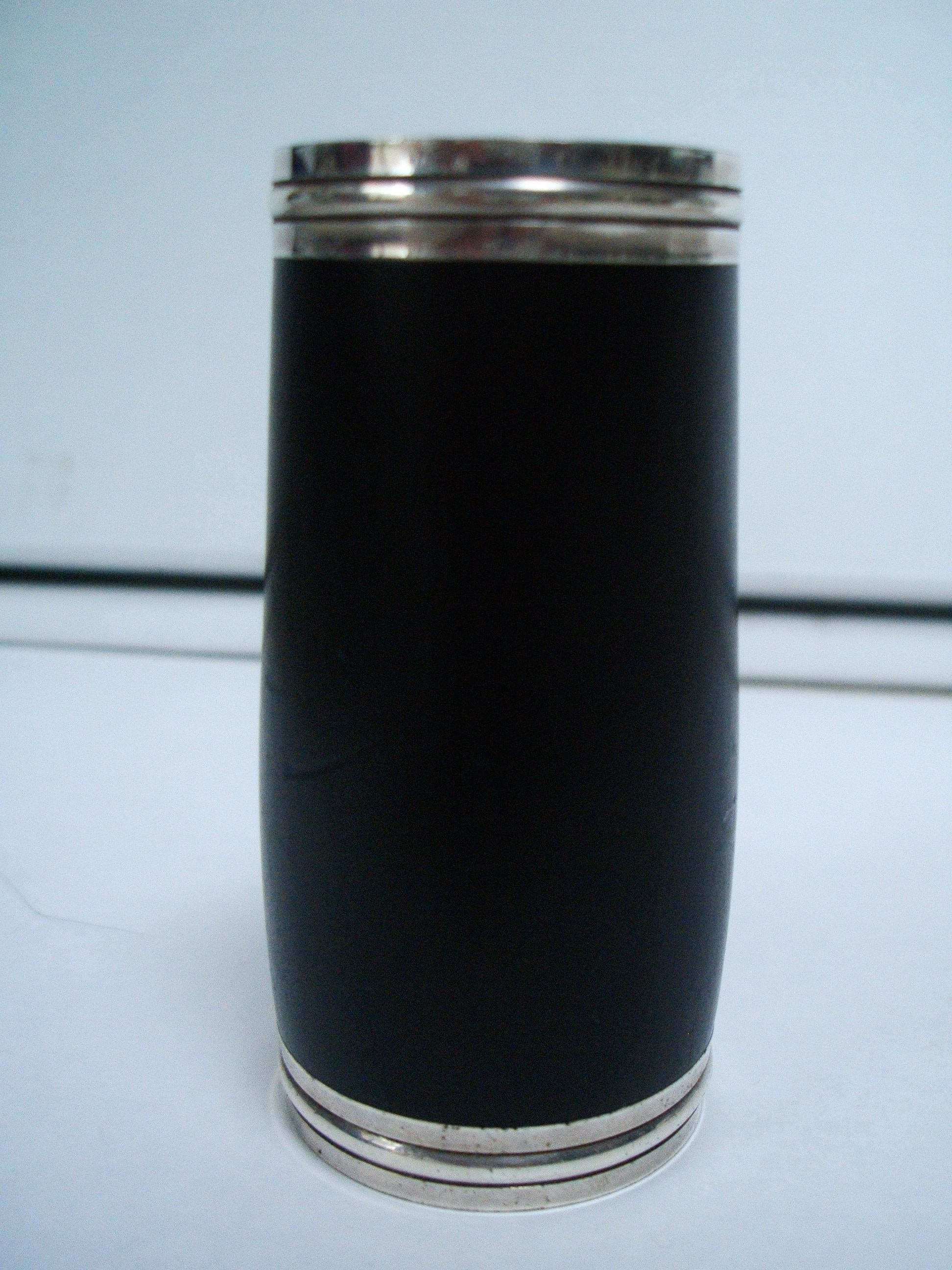 ClarinetBarrel